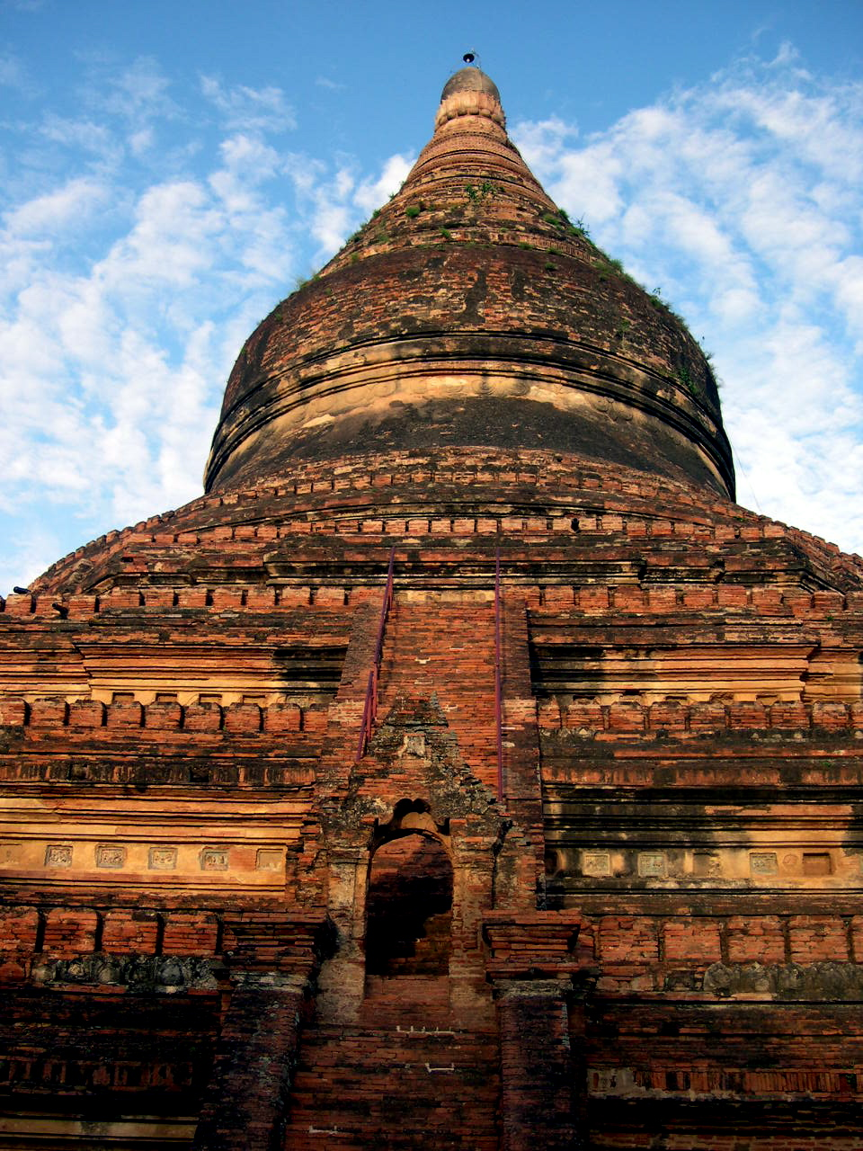 Buddhist Stupa